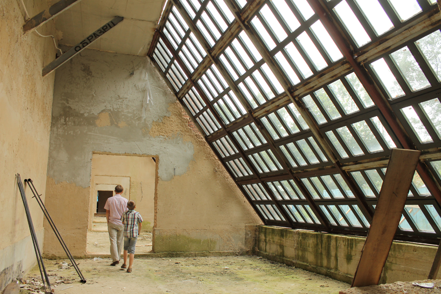 Сядзіба Агінскіх у Залессі. Аранжарэя